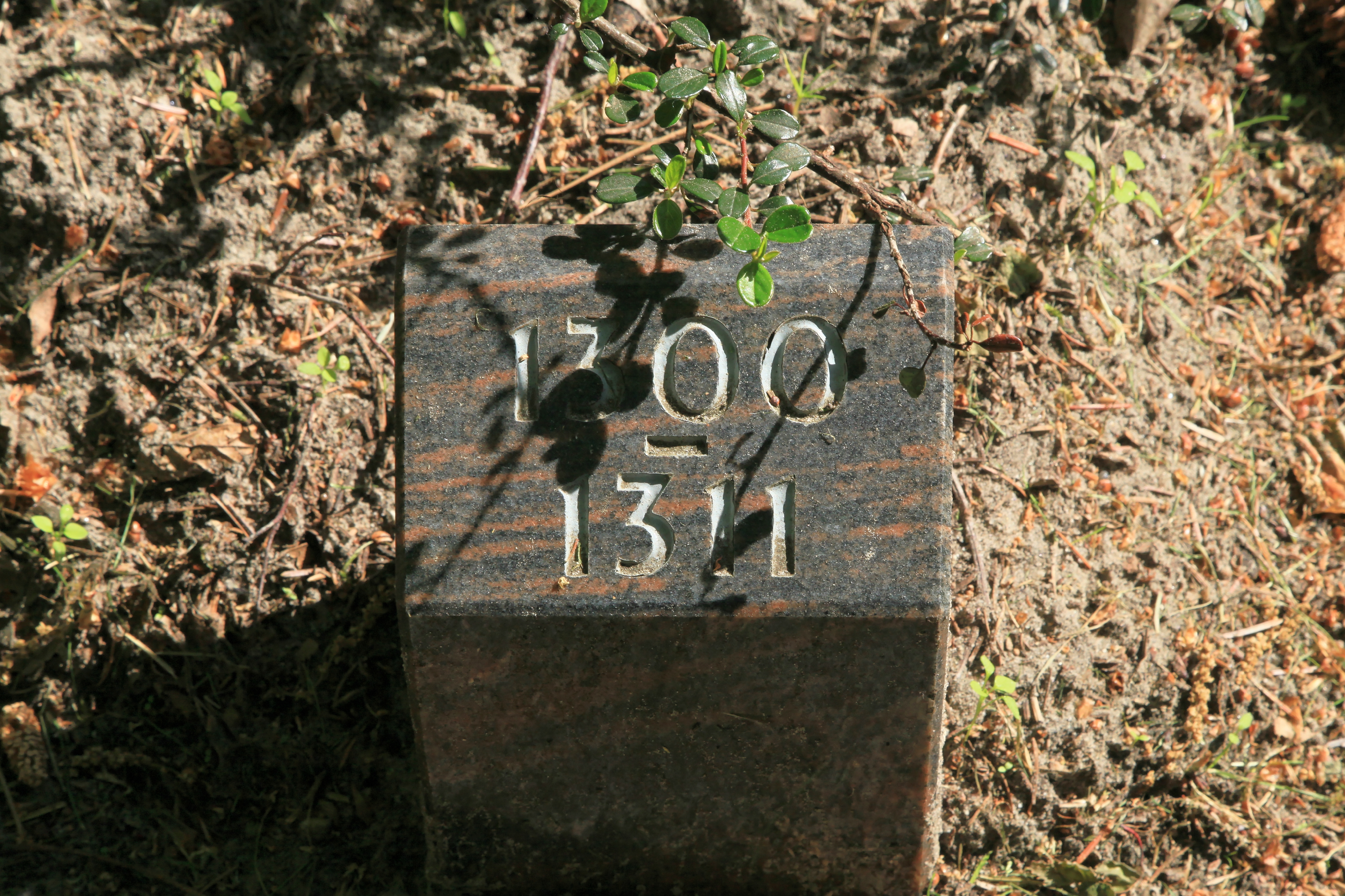 Begräbnisstätte Esterwegen, Bundesstraße 401 in Esterwegen